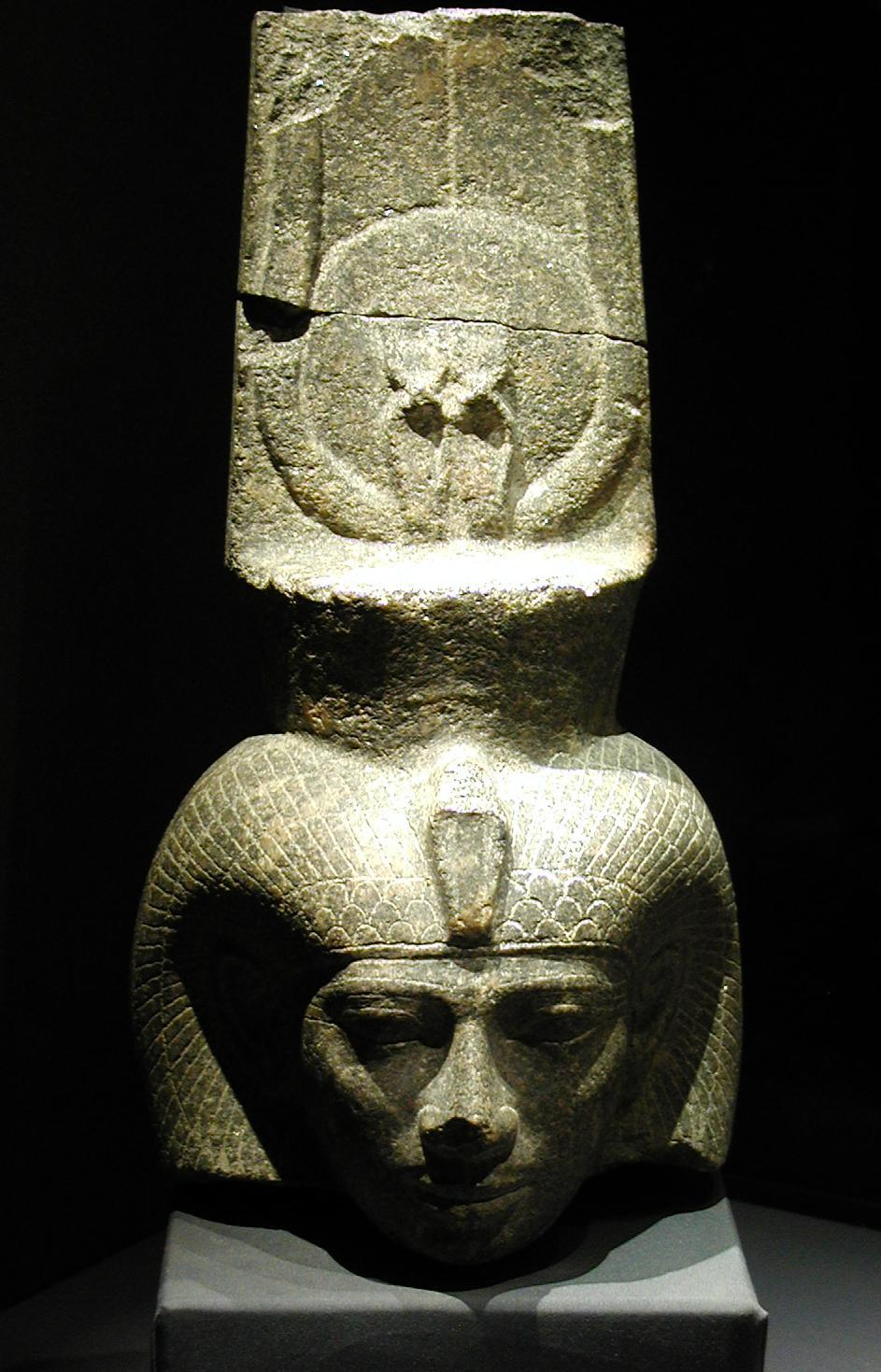 Tête de la femme d'Amon, Chepenoupet II, fille du roi Piankhy, coiffée de la couronne d'Hathor ; le reste du corps est au Sydney Museum ; en granit, trouvée à Karnak), Musée national, Alexandrie, Égypte).